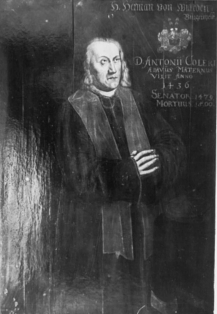 Hermann von Wickede (* 1436; † 8. April 1501), Bürgermeister der Hansestadt Lübeck. Gemälde des 17. Jahrhunderts nach älterer Vorlage für die Köhlersche Ahnengalerie.